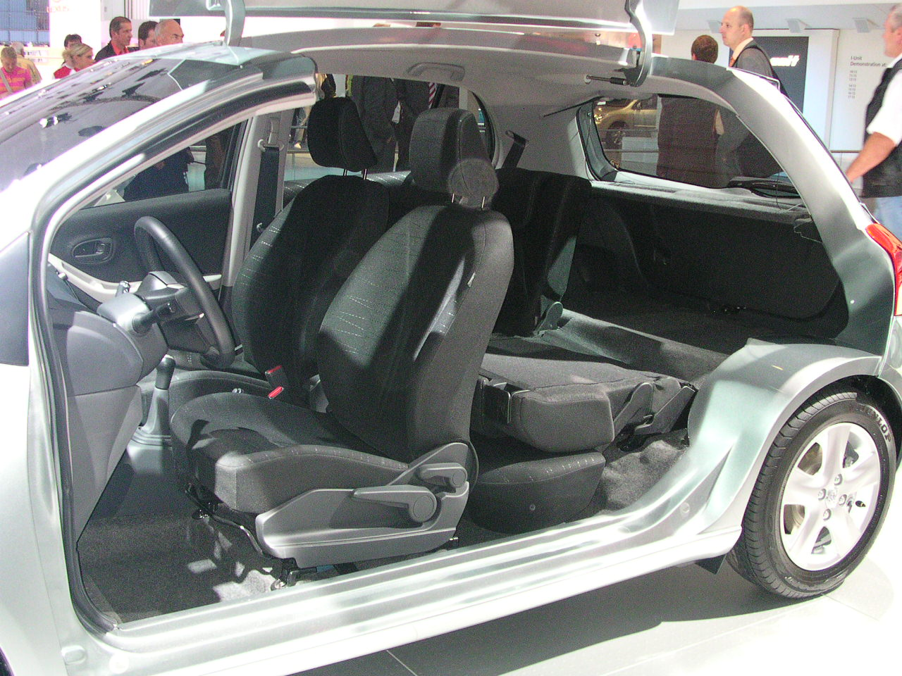 Toyota “Yaris” mit Flügeltüren bei der PKW-IAA 2005 in Frankfurt